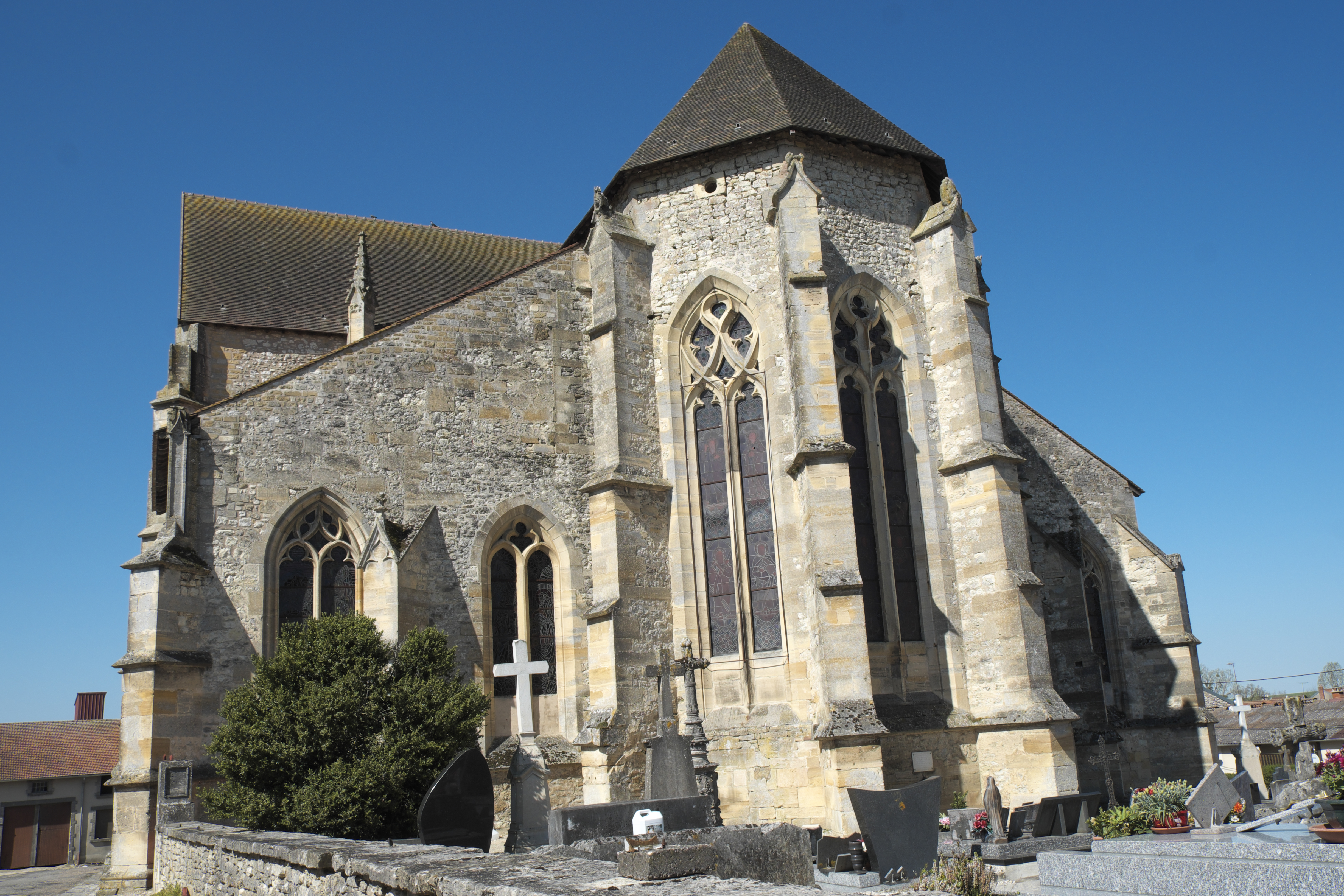 Katholische Kirche Saint-Louvent in Rembercourt-Sommaisne im Département Meuse (Lothringen) (Region Grand Est/Frankreich)